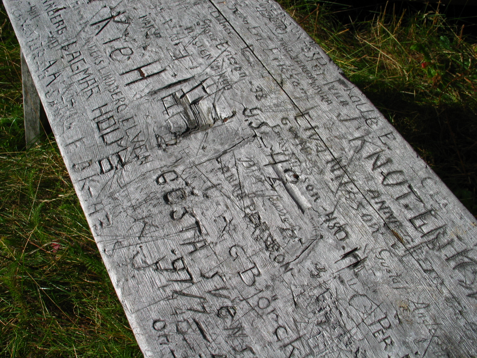 Sittbänk med inristningar vid turiststationen, Västra Arådalen Foto: Användare:Toggan